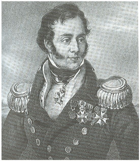 Vice admiraal Koopman